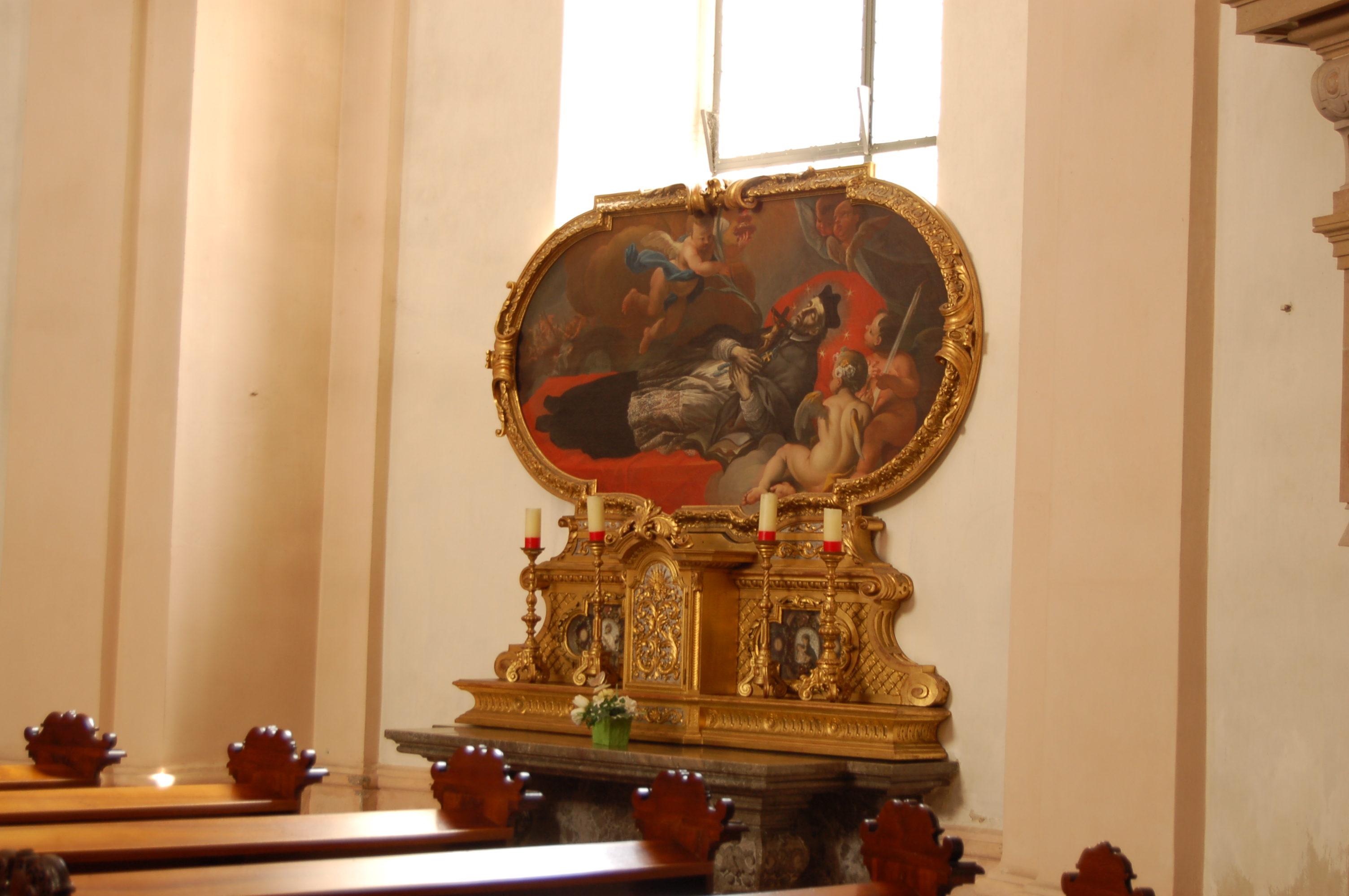 Linz, Priesterseminarkirche Hl. Kreuz. Rechter Seitenaltar mit Gemälde von Johann Georg Schmidt.